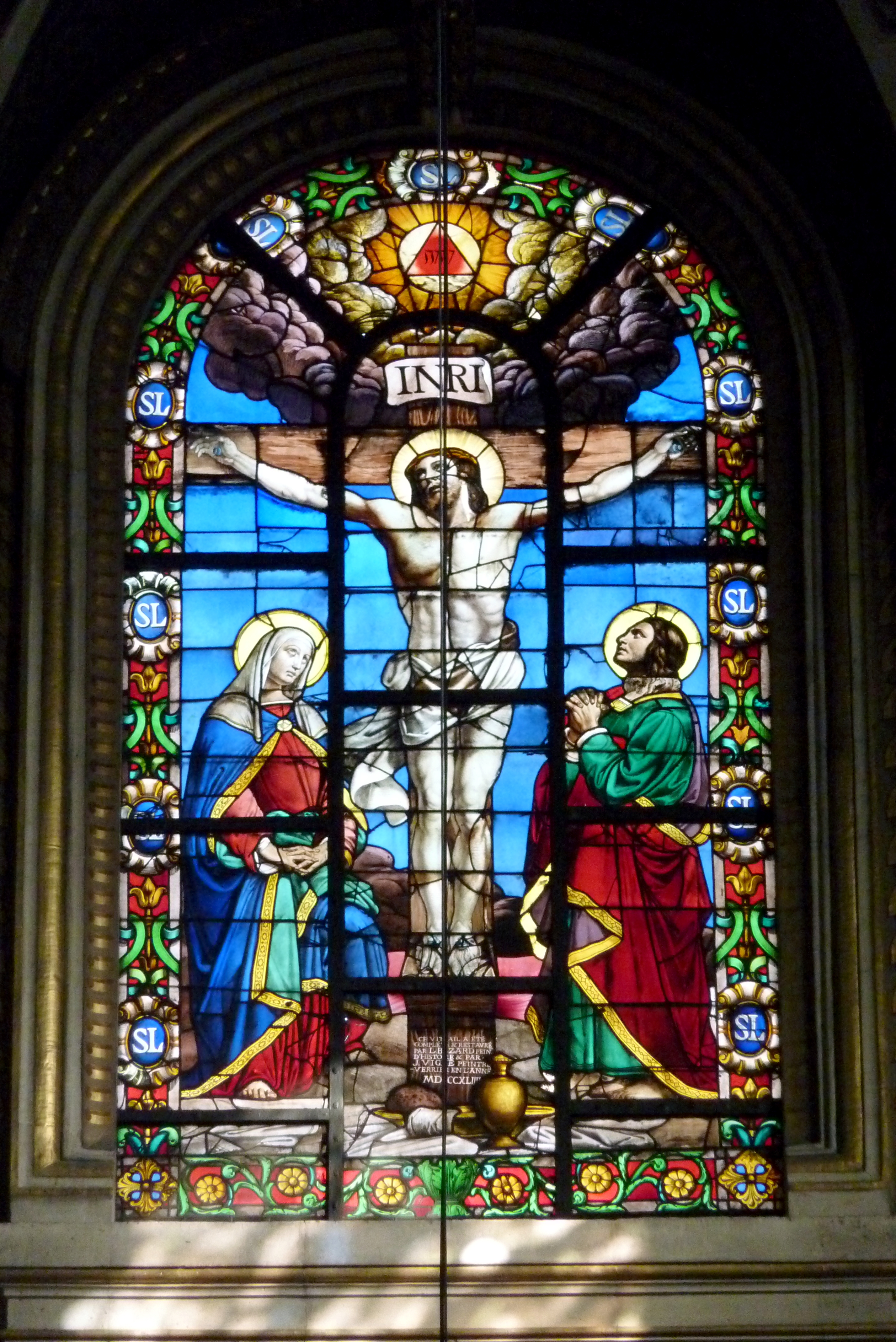 Katholische Pfarrkirche Saint-Louis-en-l'Île auf der Île Saint-Louis im 4. Arrondissement von Paris, Bleiglasfenster im Chor, Darstellung: Kreuzigung Christi